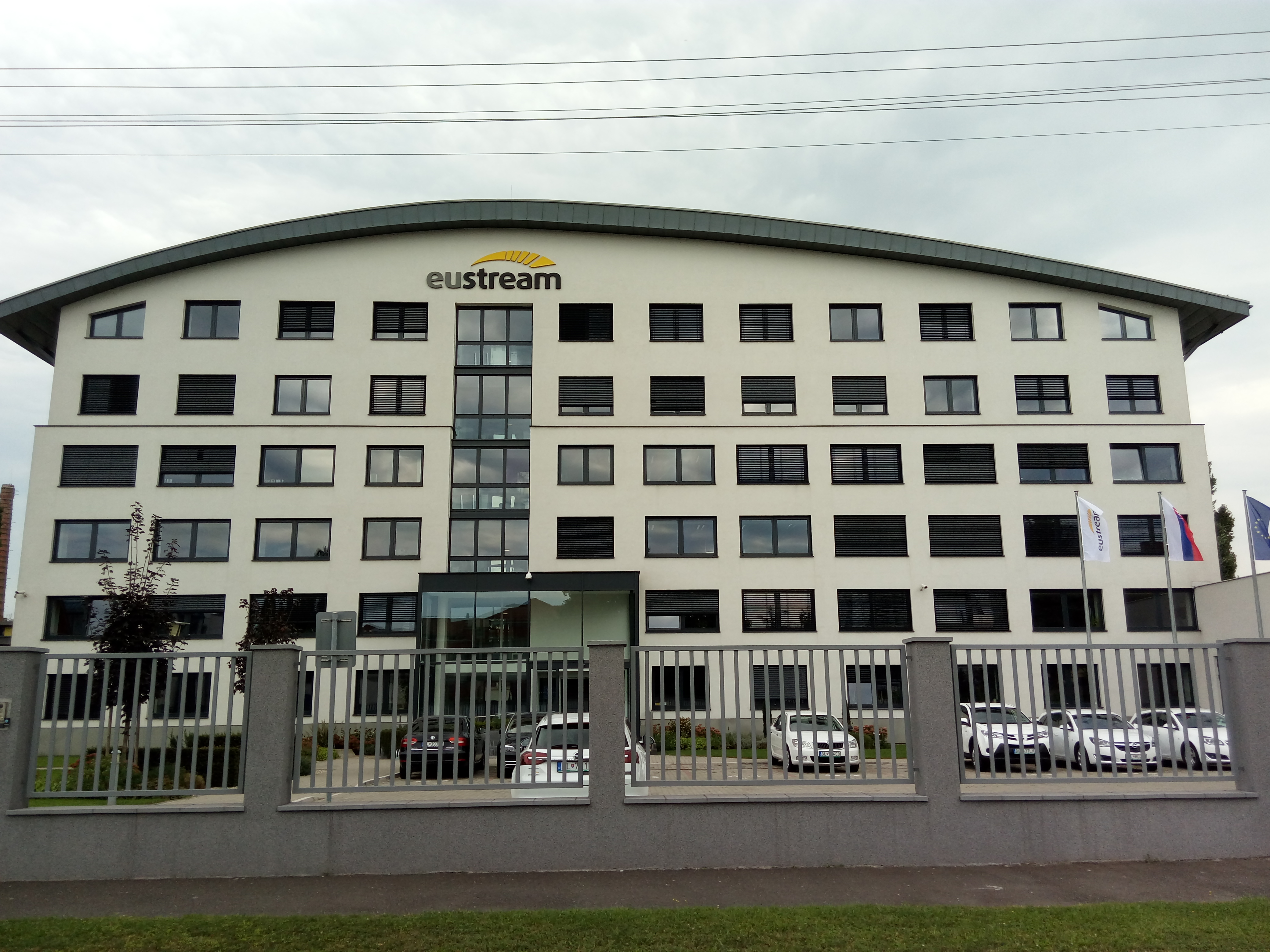 Votrubova 11/A, Ružinov, Bratislava